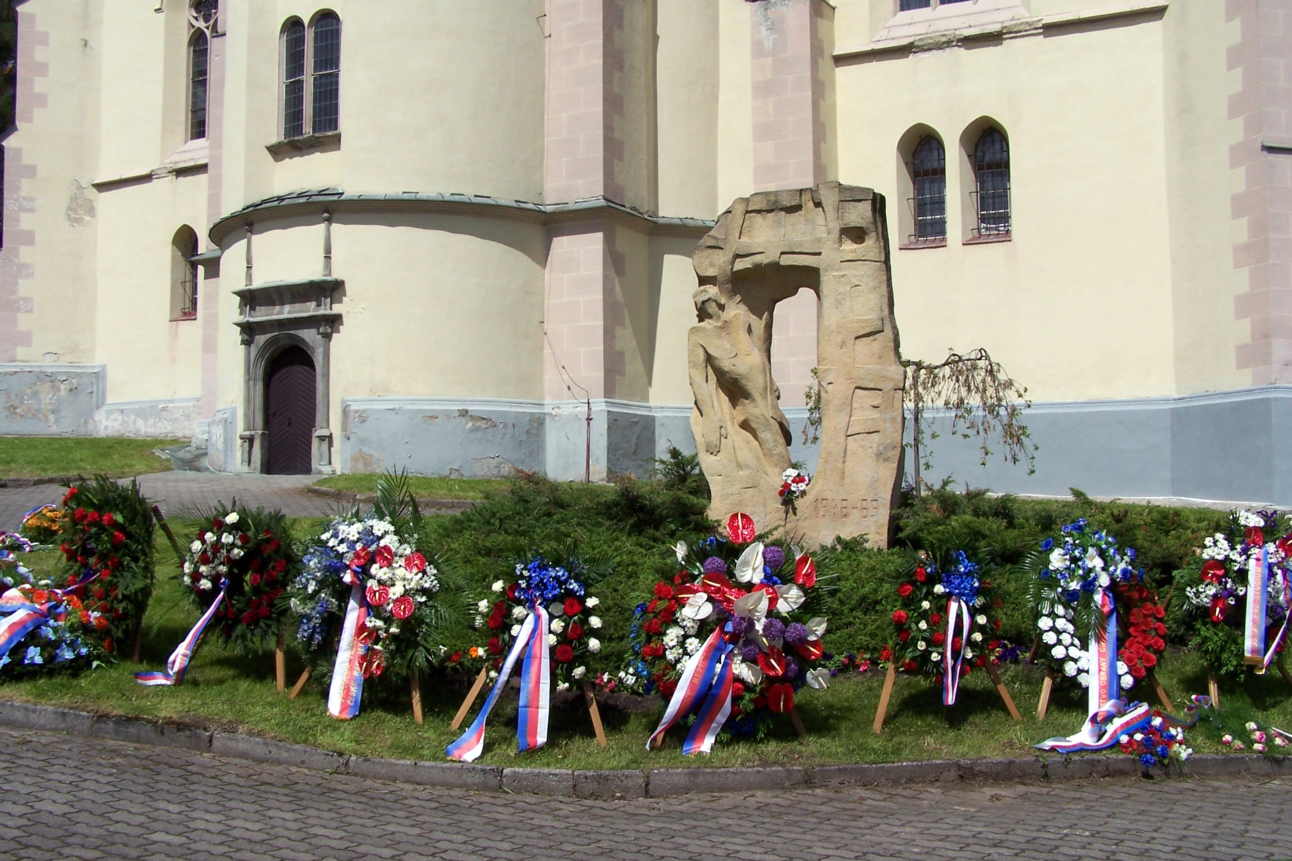 Vzpomínkové setkání Jáchymovské peklo 2009. Po skončení hlavního sobotního programu.